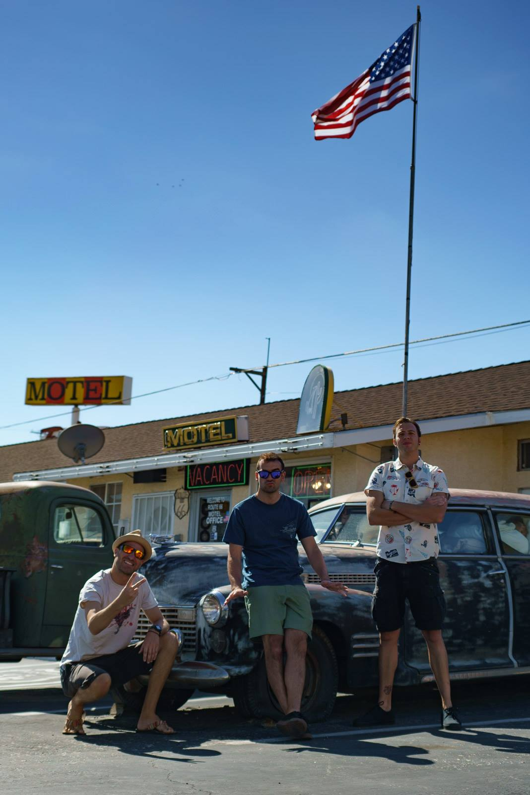 los angeles